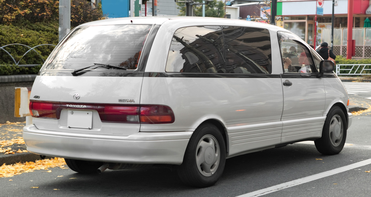 Toyota Estima 2.4 4WD